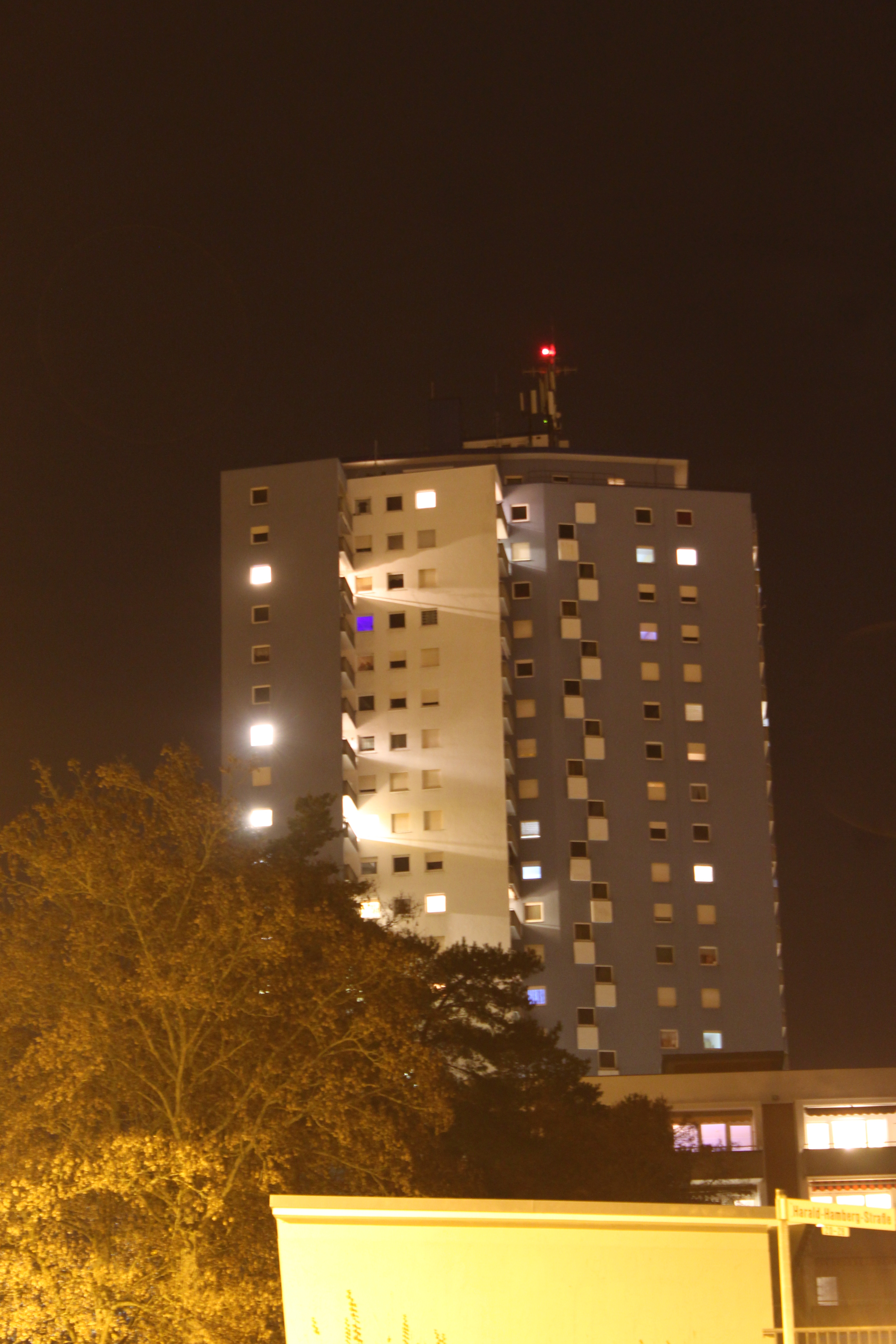 Blaues Hochhaus Schweinfurt bei Nacht